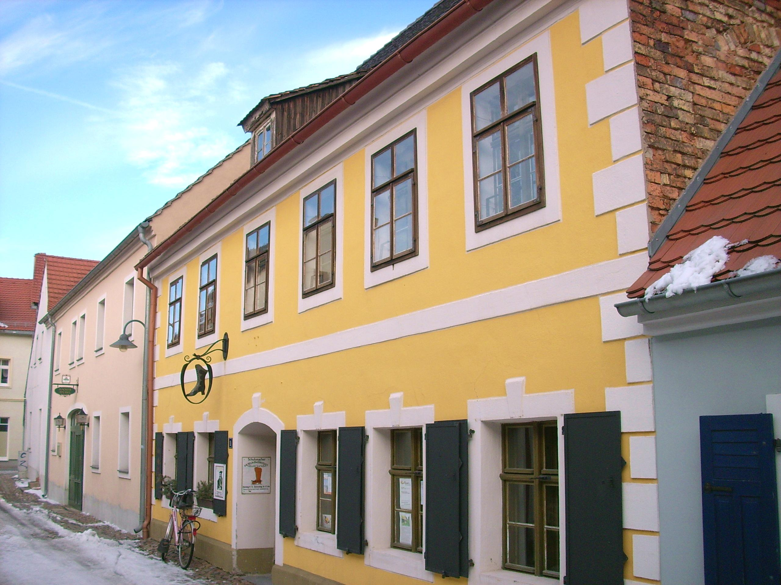 Wohnhaus, Lange Straße 1 in Hoyerswerda